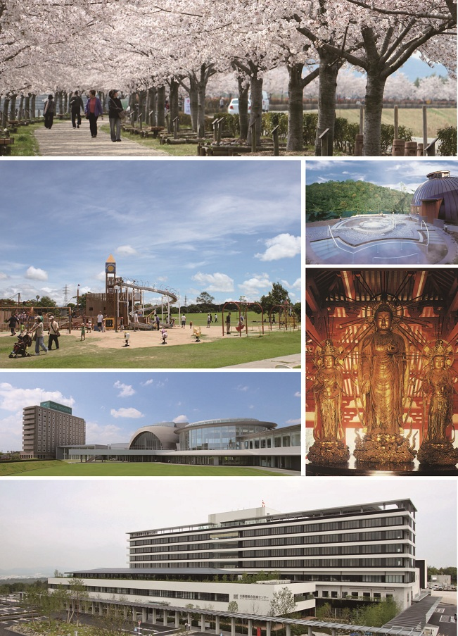 小野市モンタージュ1段目:File:Ono Sakurazutsumi.JPG by Rocky2takeuchi2段目左:File:Himawarinooka Park.JPG by Rocky2takeuchi3段目左:File:Éclat.JPG by Rocky2takeuchi4段目:File:Kita-harima Medical Center.jpg by Rocky2takeuchiほか出所不明